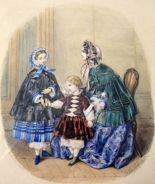 Mère avec deux enfants, by Héloïse Suzanne Colin